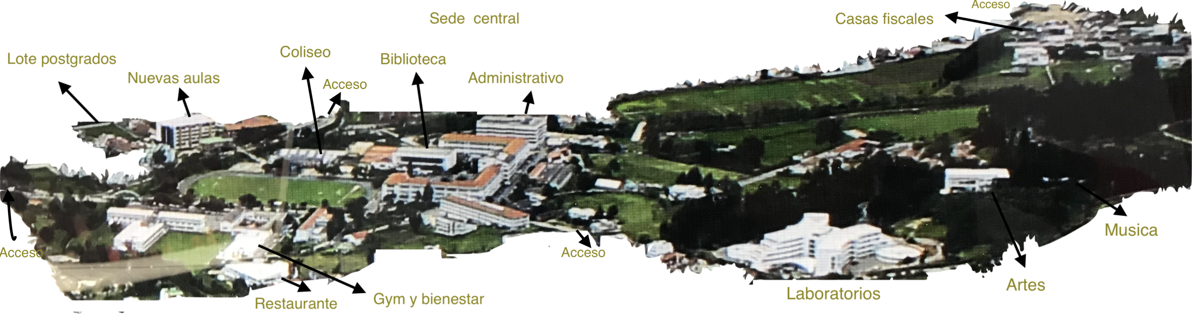 Panoramica sede central